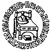 На большой печати Ивана IV Грозного "печать великого княжества Смоленского" изображает трон с лежащей на нём шапкой. Позже этот сюжет стал гербом Твери.